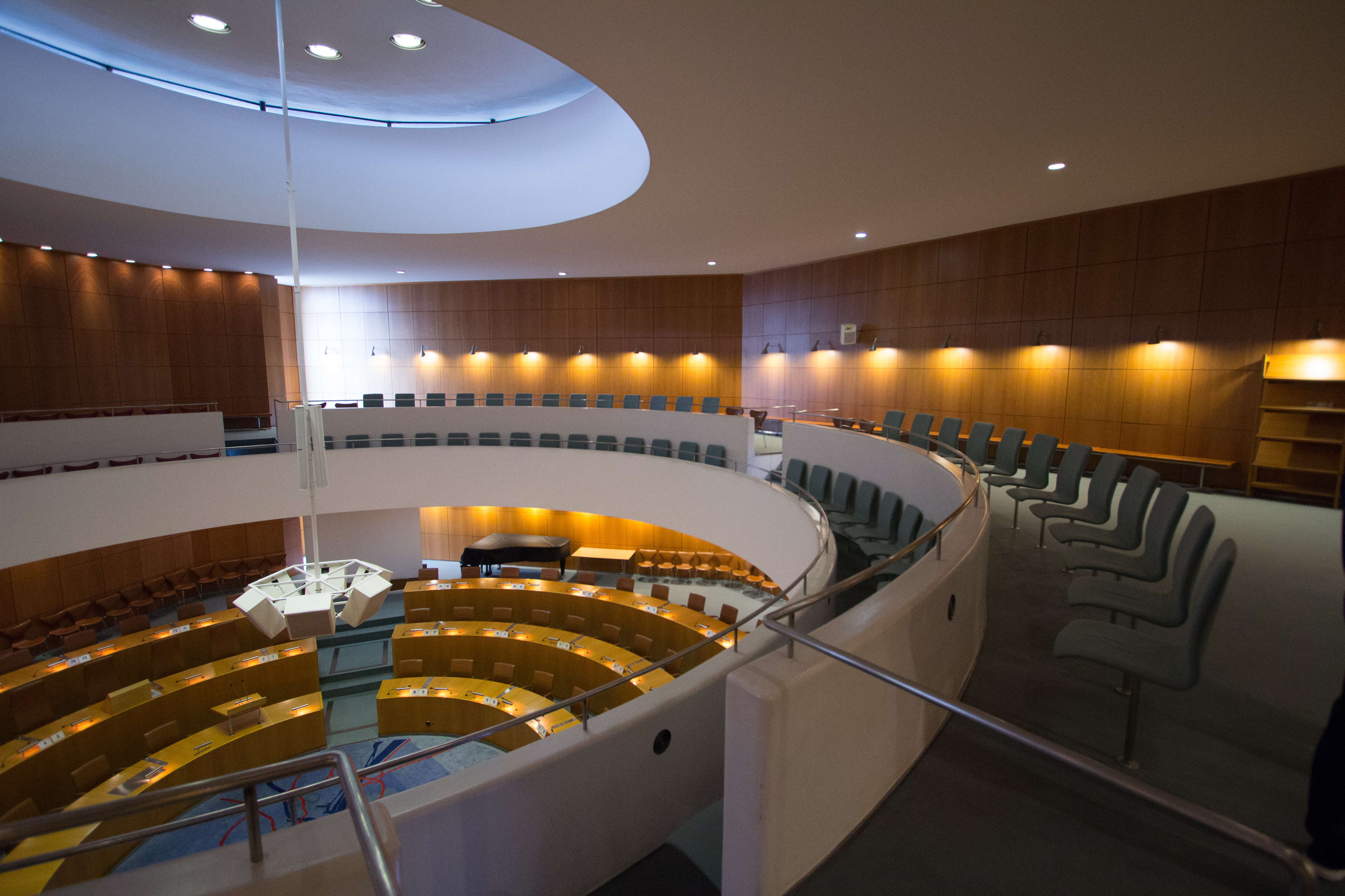 Ratssaal im Mainzer Rathaus am 13. November 2017